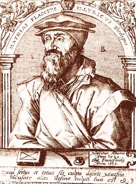 Flacio Illirico (Flacius Illyricus), Matthias (o Matija Vlacic o Francovich) (1520-1575) e flacianismo